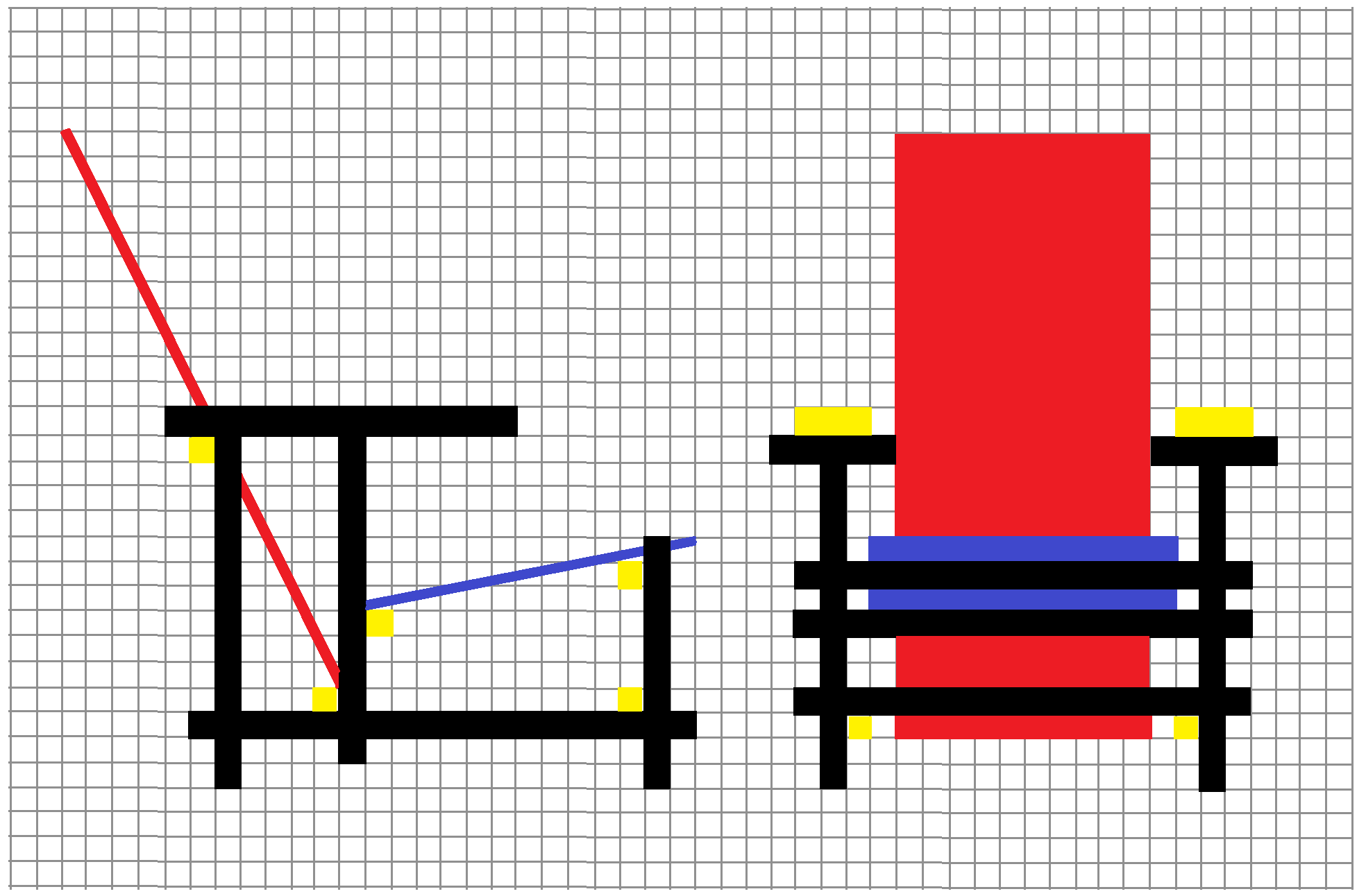 Gerrit Rietveld, Chaise Rouge et Bleu, tracés régulateurs